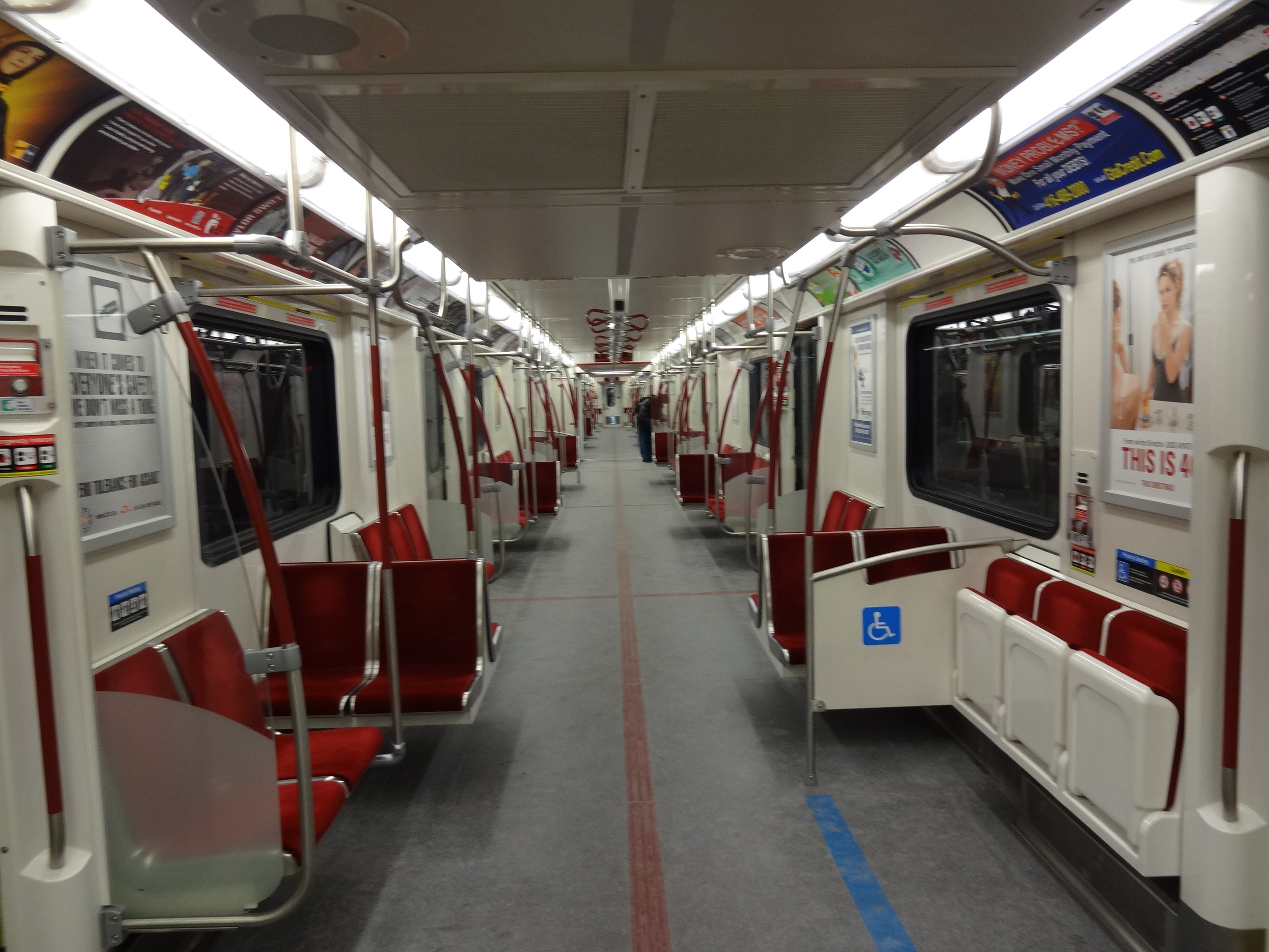 Metrô em Toronto.